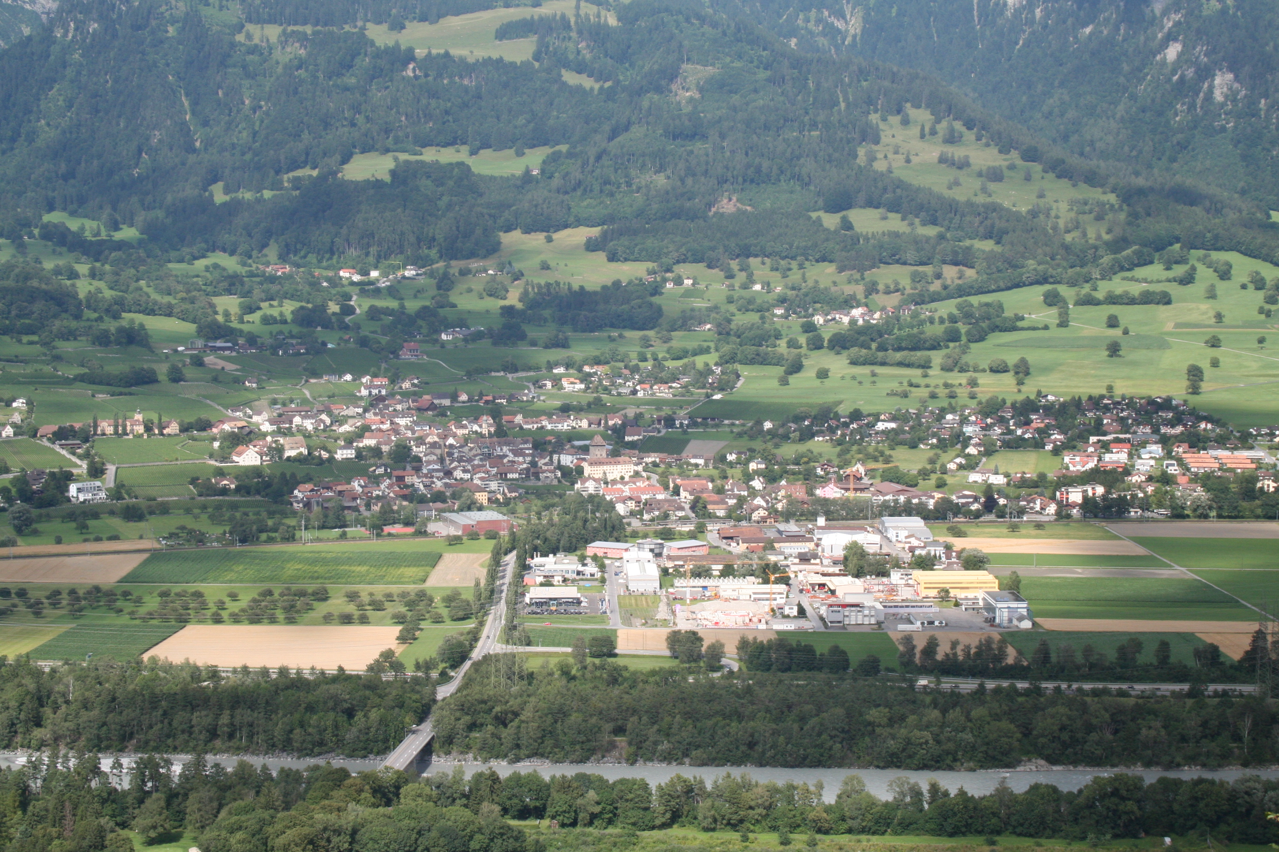 Maienfeld, Ansicht von Südwesten